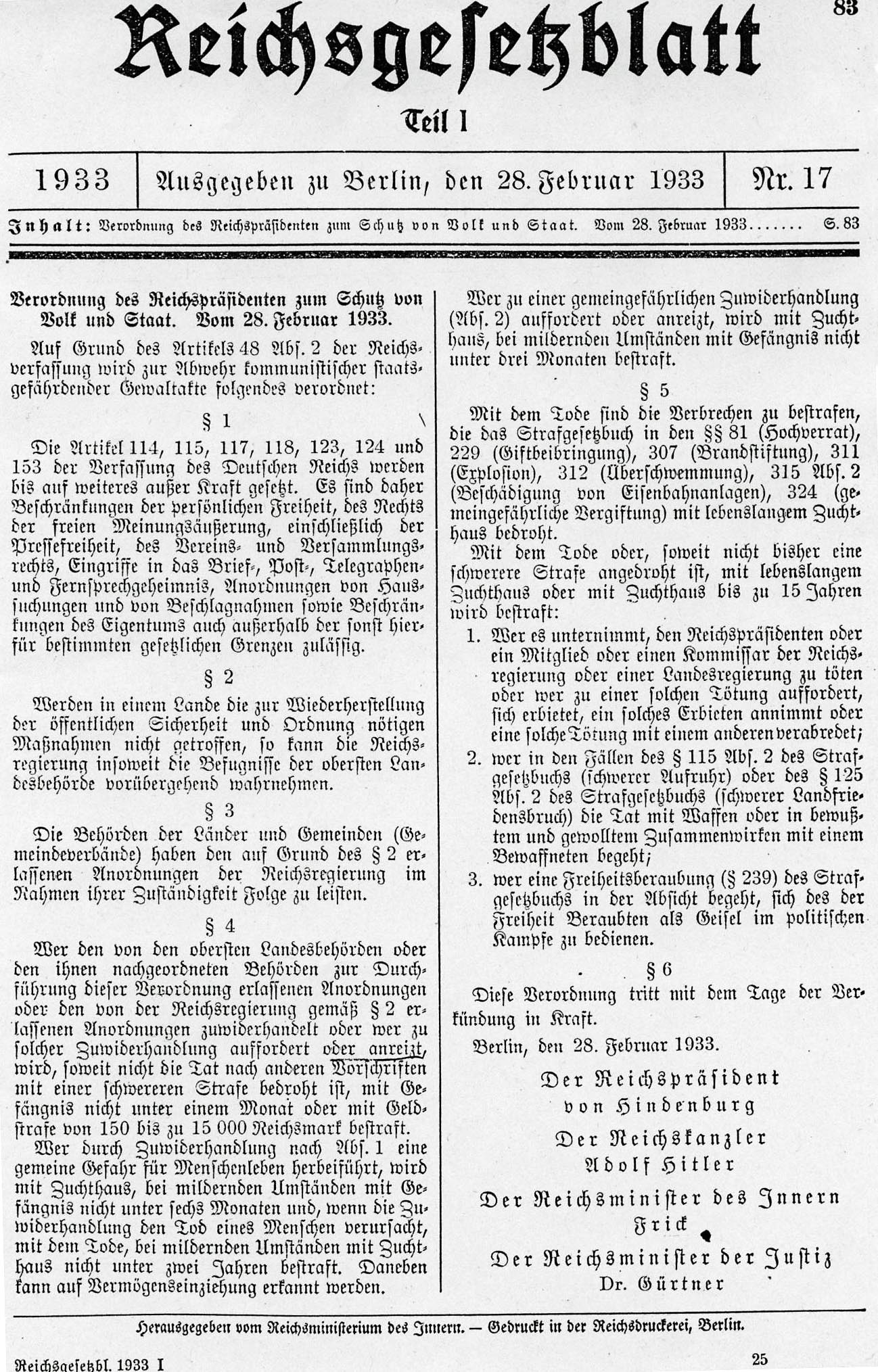 Reichstagsbrandverordnung 83 own scan